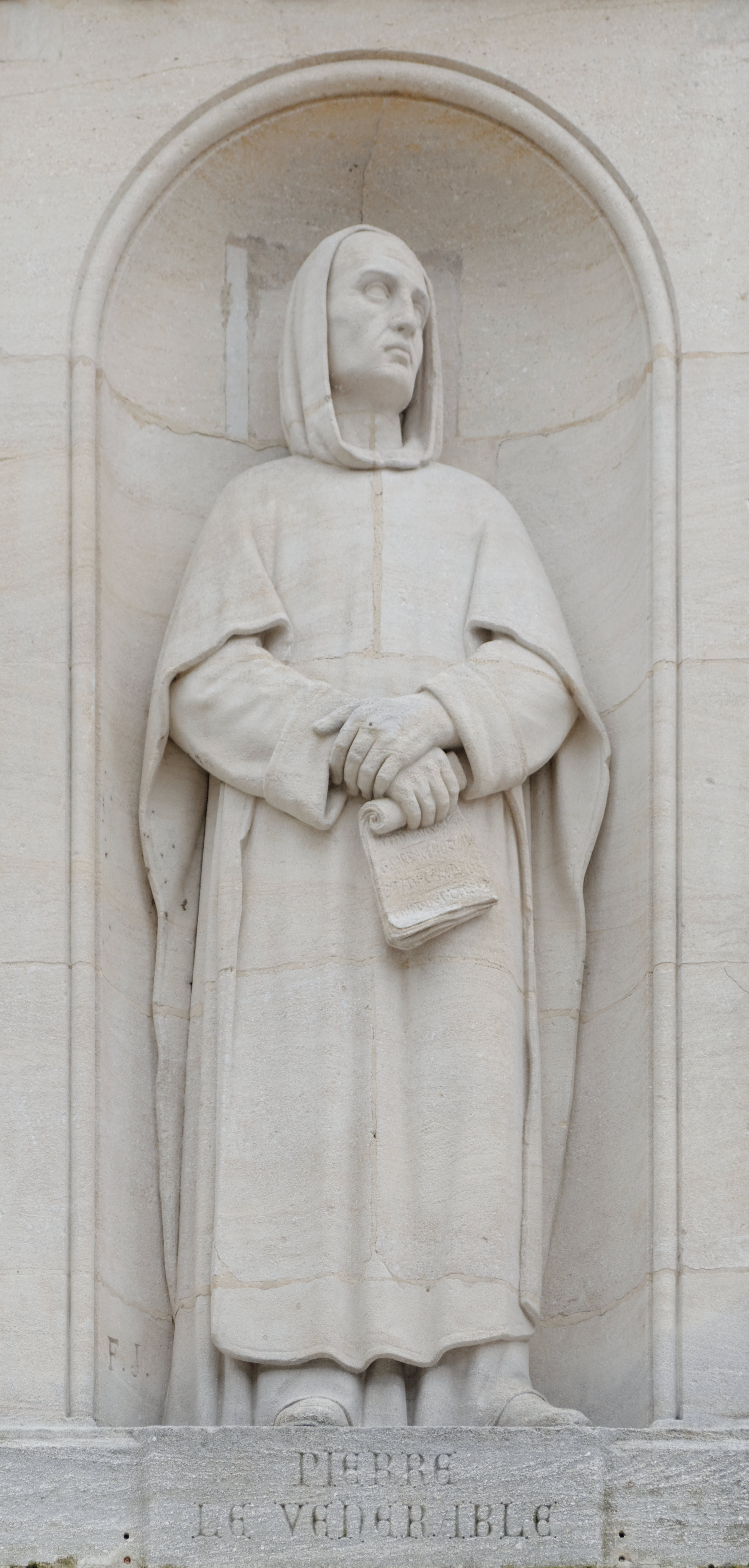 Pierre de Montboissier dit Pierre le Vénérable était le neuvième abbé de Cluny dès 1122. Il est né entre 1092 et 1094 et mort le 25 décembre 1156.